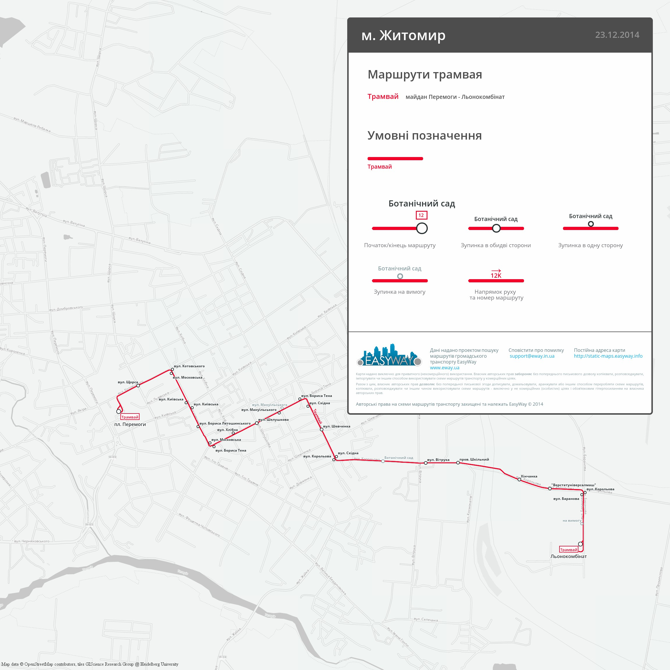 Схема трамвайного маршруту у місті Житомир